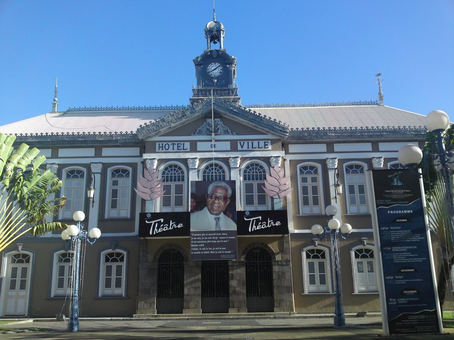 Fort de France, le théâtre, ancien hôtel de ville, le 25 décembre 2008